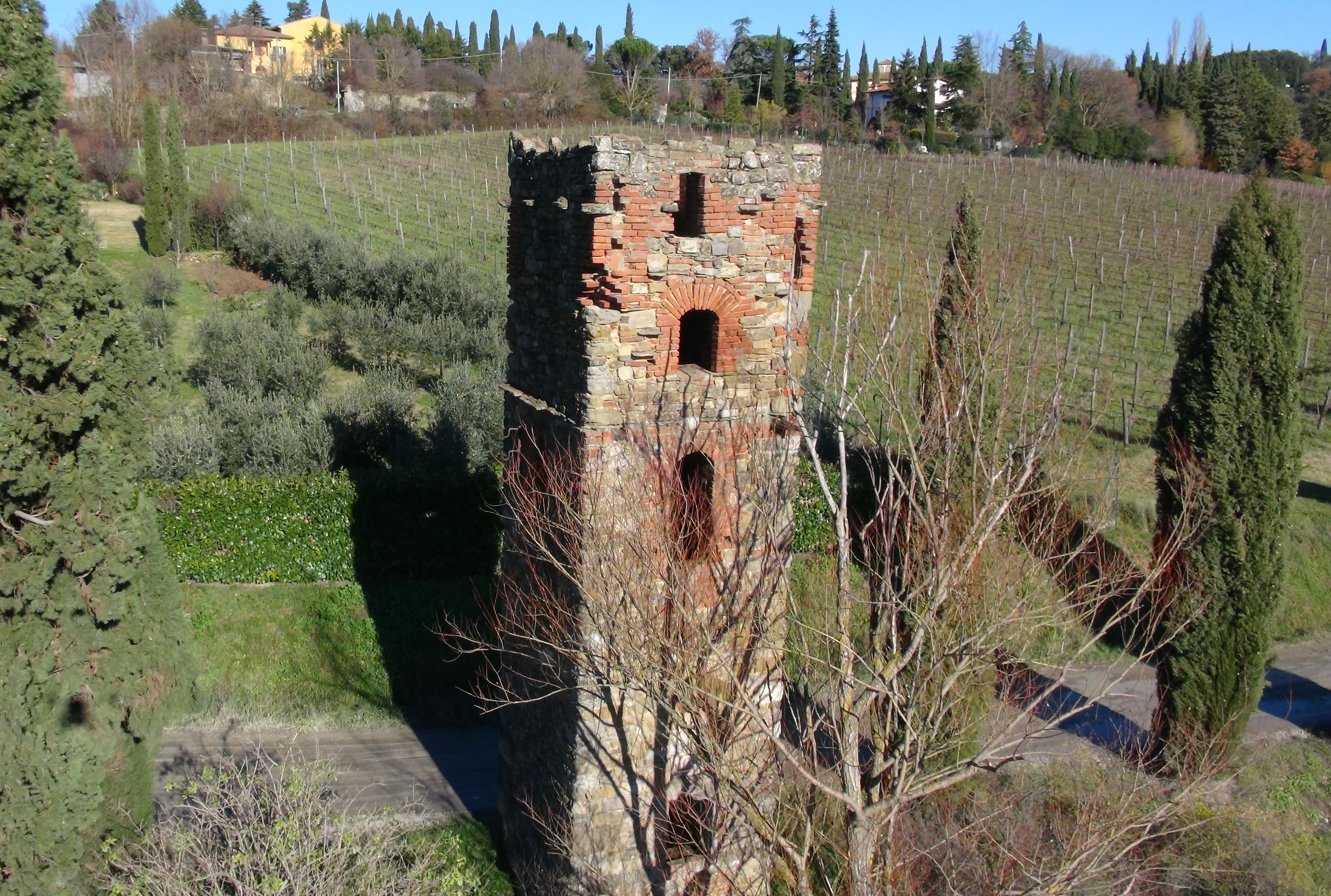 Torre di Gnicche (Federigo Bobini), famoso brigante dell'ottocento vissuto ad Arezzo. Sembra che la torre venisse usata per nascondere la refurtiva.